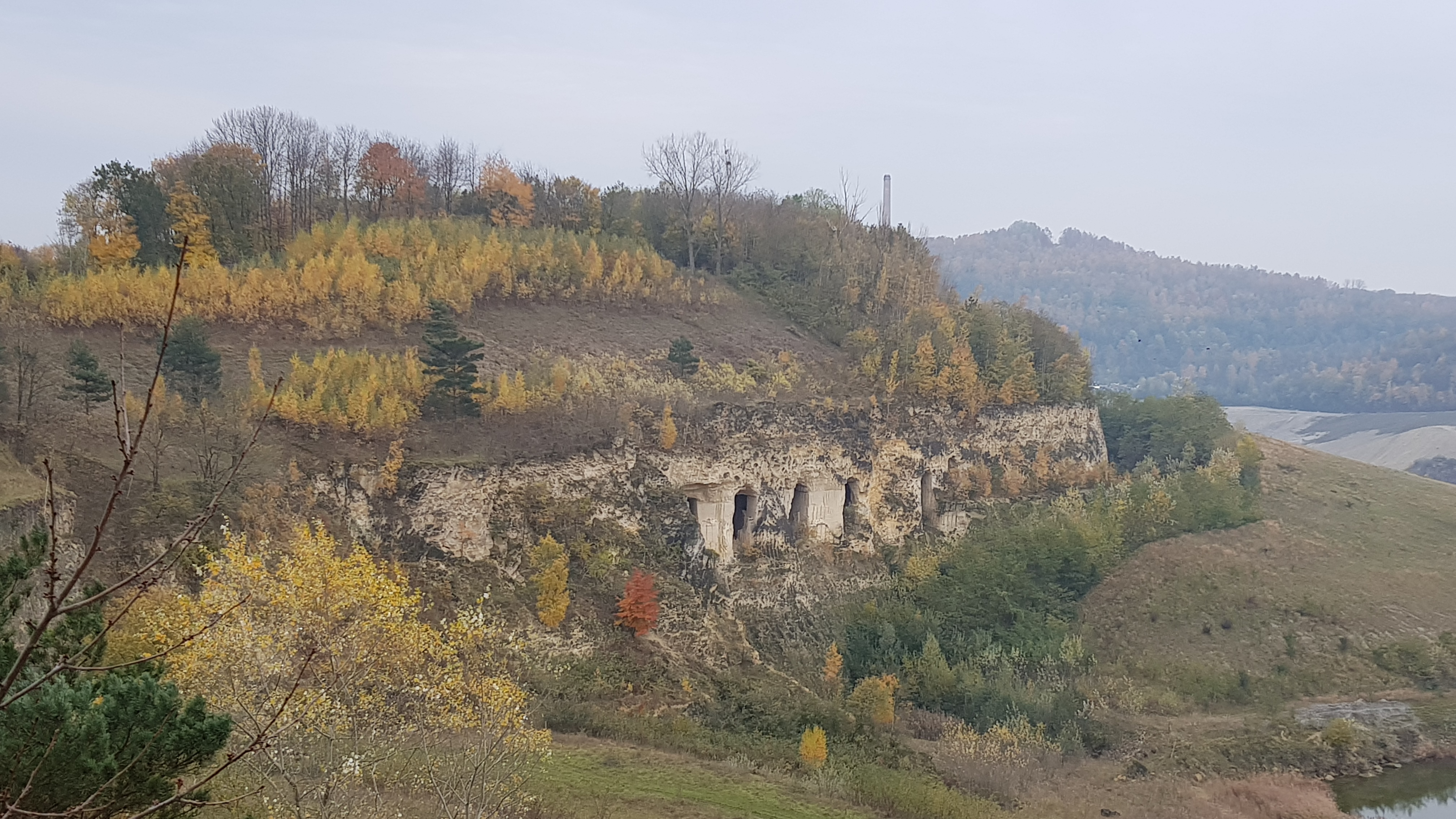 Oehoevallei op de Sint-Pietersberg, Maastricht, Nederland